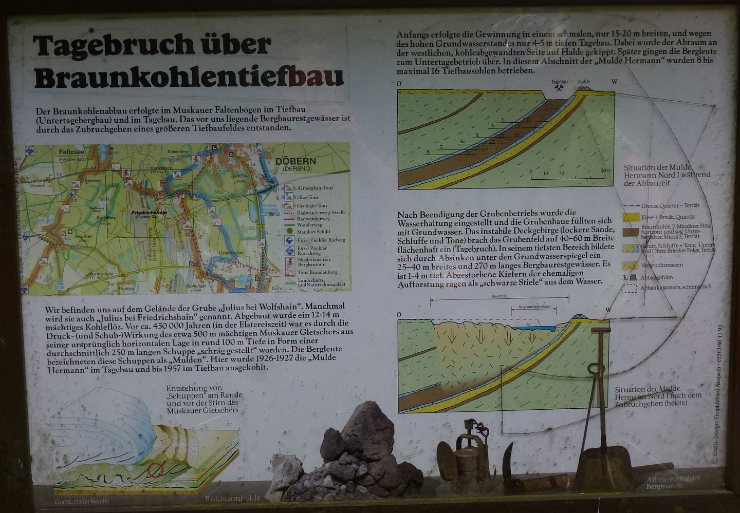 Informationstafel zum Tagebruch über Braunkohlentiefbau in der Gemeinde Felixsee